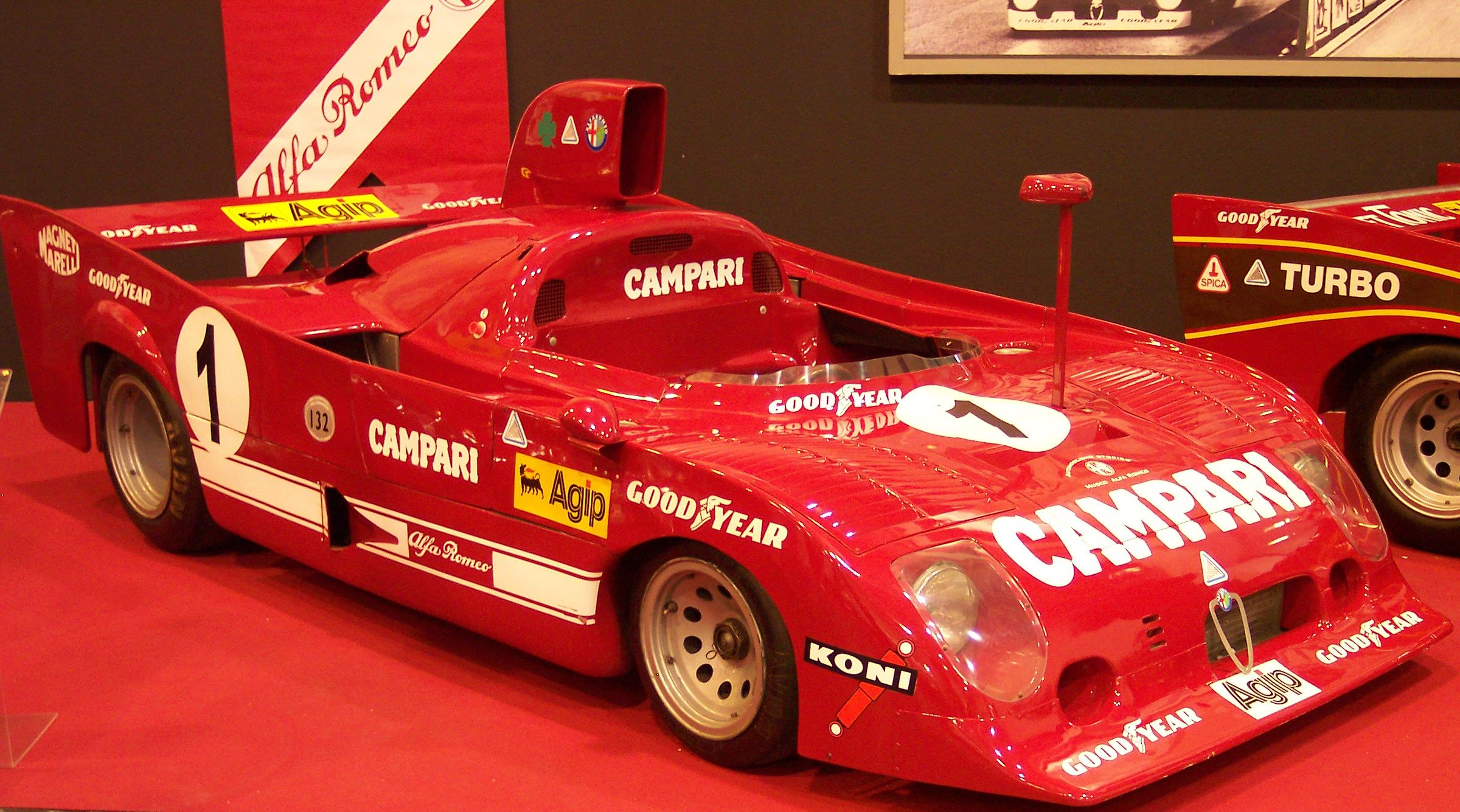 Alfa Romeo 33 TT 12 1975